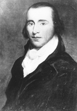 John Breckinridge (1760-1806)